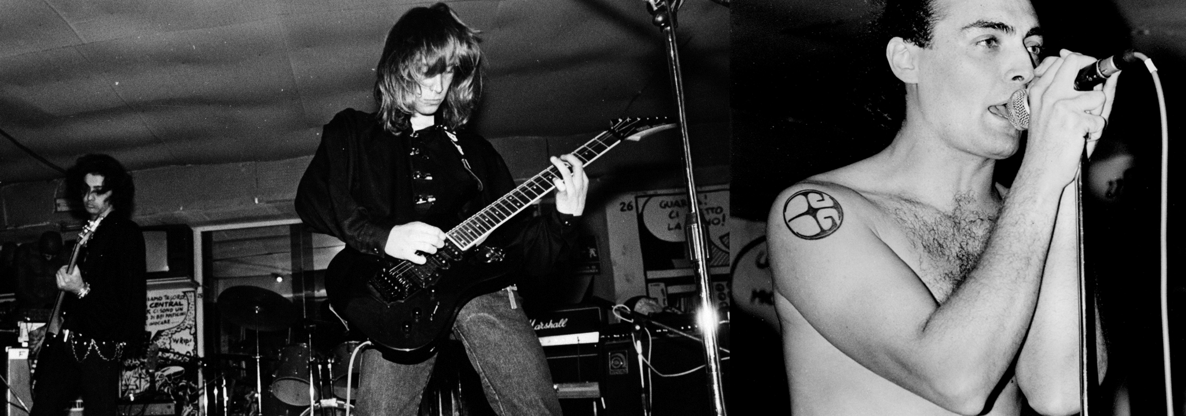 ERP-Exit Refugium Peccatorum in concerto al Uonna Club di Roma